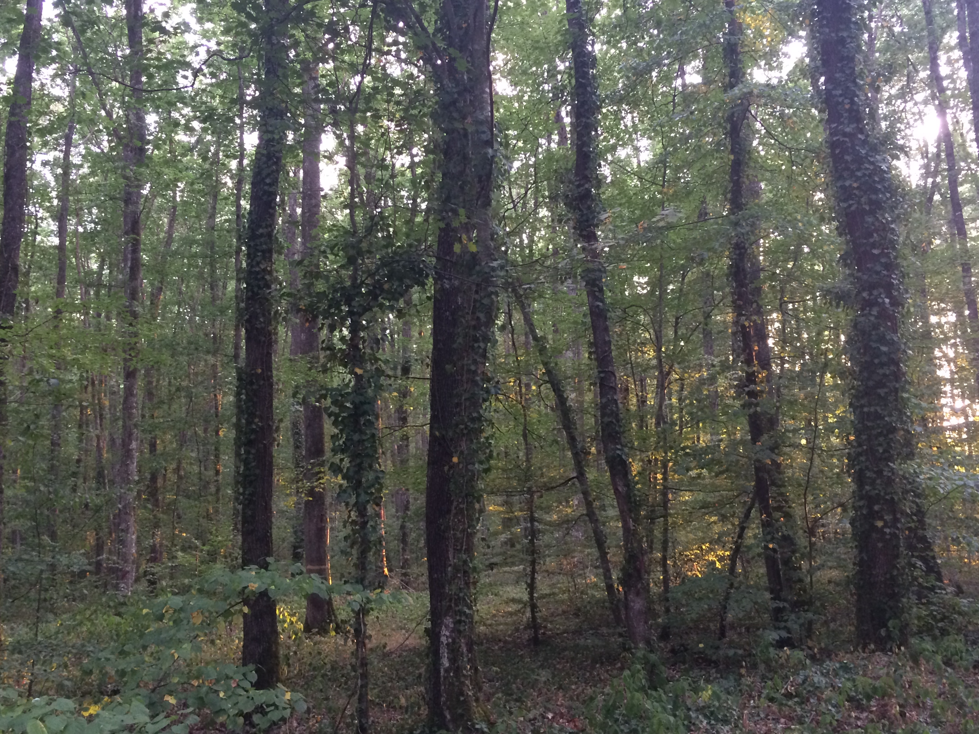 Sous-bois de la forêt de Moladier